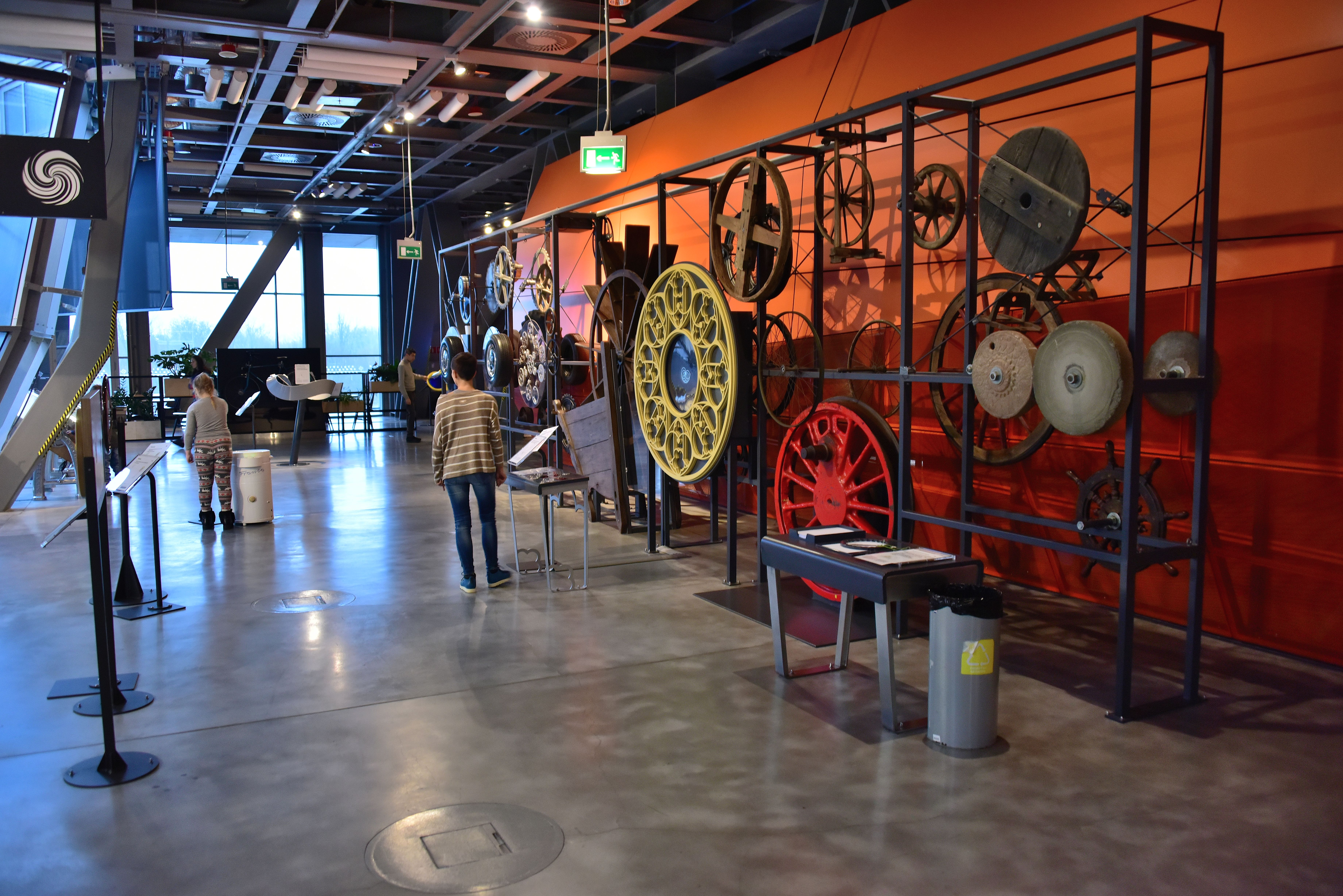 Centrum Nauki Kopernik w Warszawie.